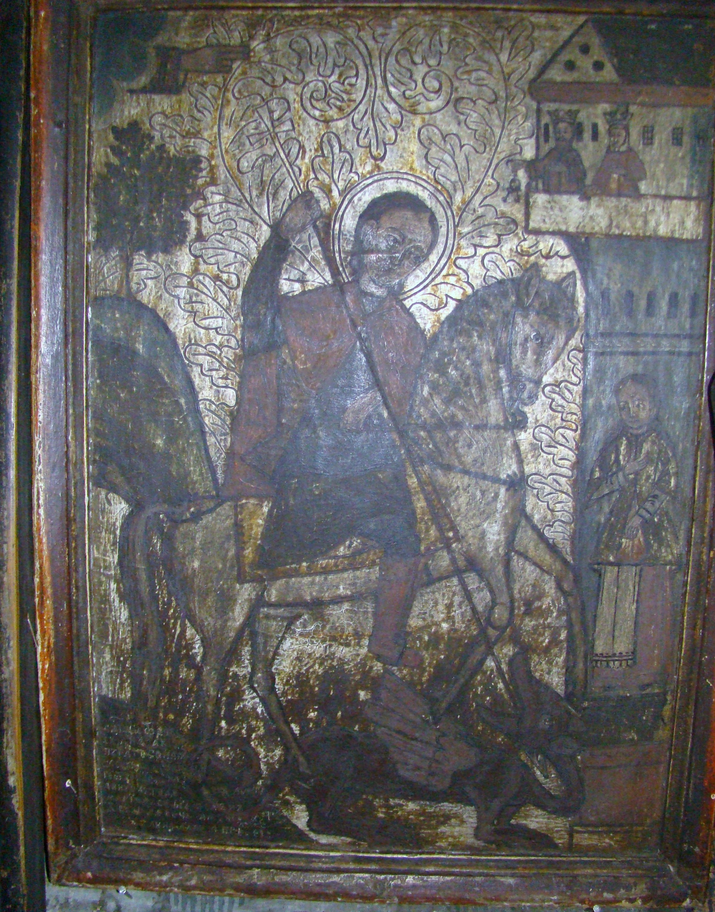 Biserica de lemn "Sfântul Nicolae" (a Nistoreştilor) , oraş SĂLIŞTEA DE SUS